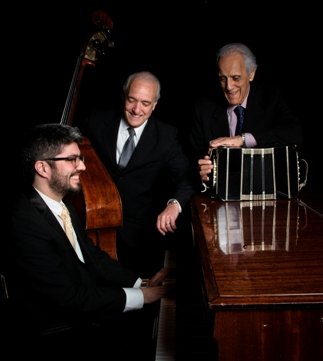 Trío formado por los maestros Víctor Lavallén, Horacio Cabarcos y Pablo Estigarribia.